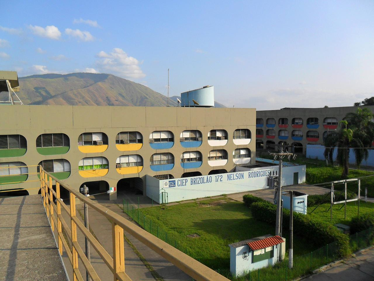 CIEP em Nova Iguaçu.